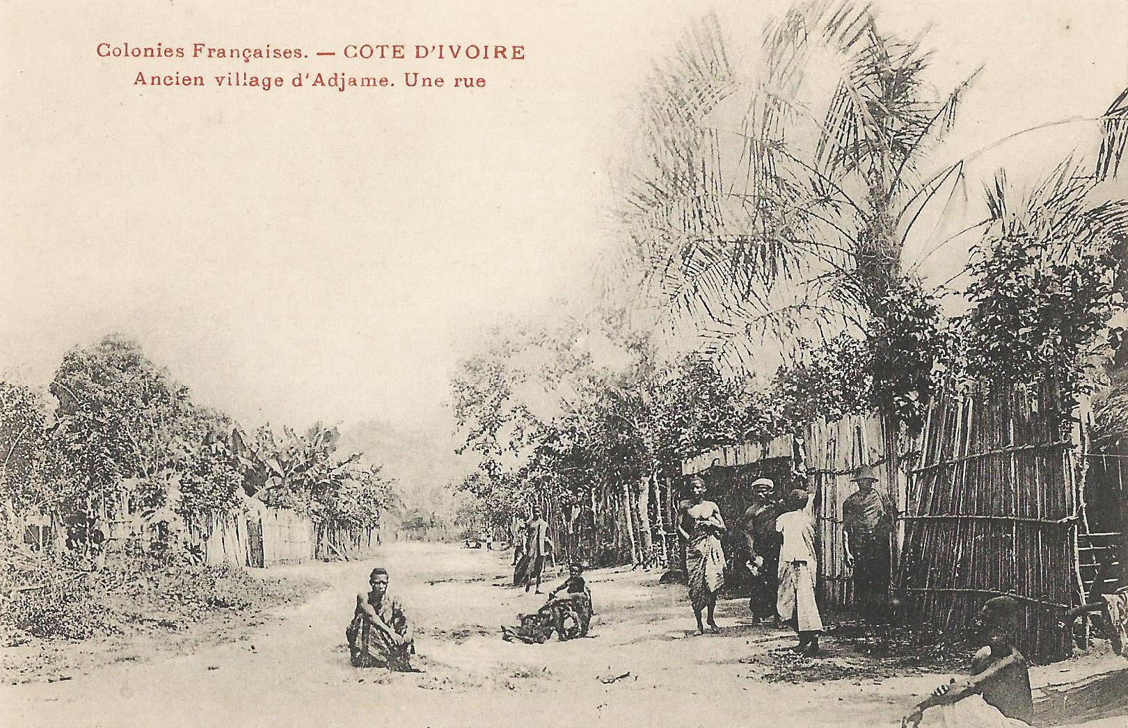 Carte postale ancienne. Colonies françaises. Côte d'Ivoire. Ancien village d'Adjama. Une rue. Sans mention d'auteur, d'éditeur, de date, ni au recto ni au verso.. Cependant la date peut être estimée entre 1892 et 1920 (cf. .Images, mémoires et savoirs: une histoire en partage avec Bogumil Koss, p. 310.)